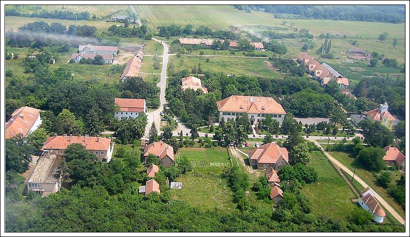 Forrás